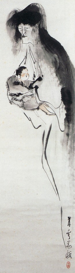 Kosodate Yūrei (子育て幽霊図)